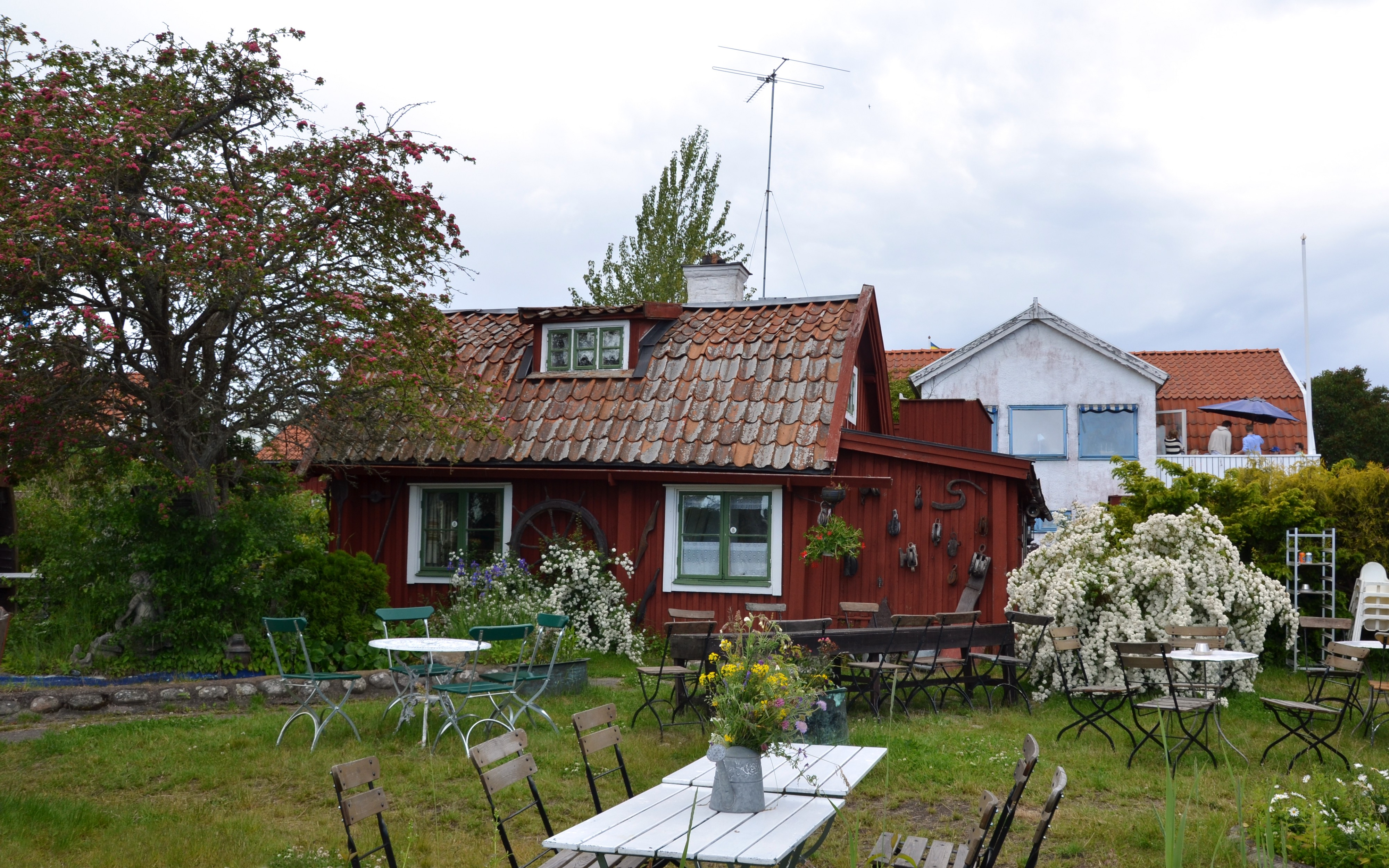 Strindbergssgården på Sandhamn.